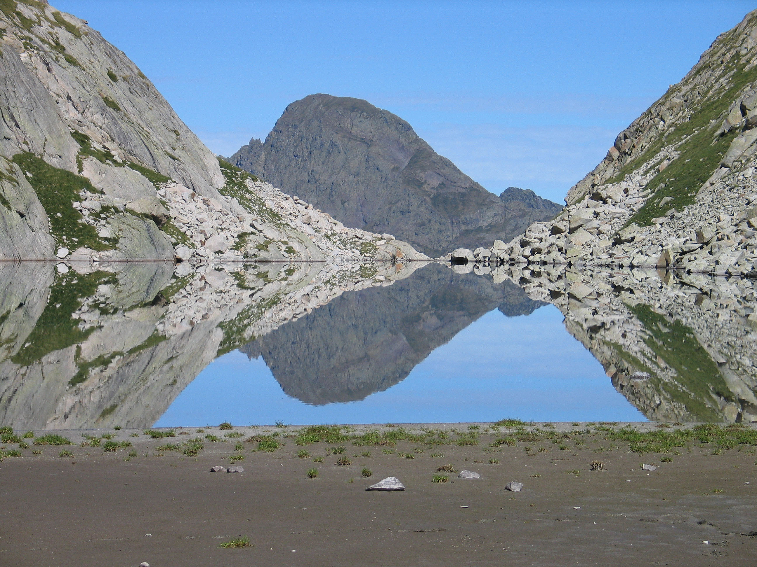 Benasque, Ibón de Barrancs